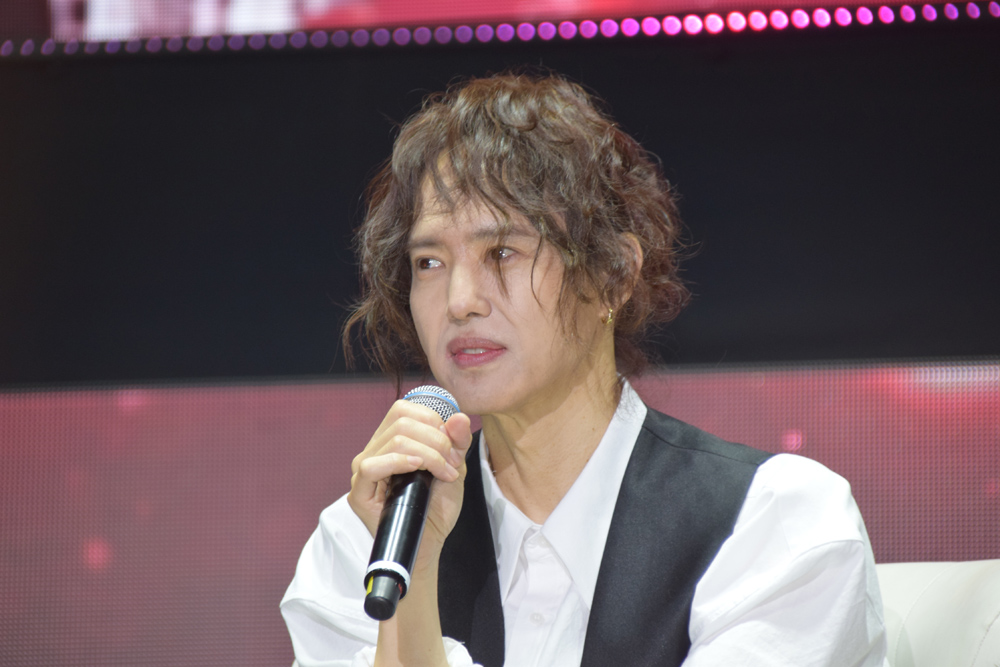 양준일, 팬미팅 기자간담회 2019.12.31